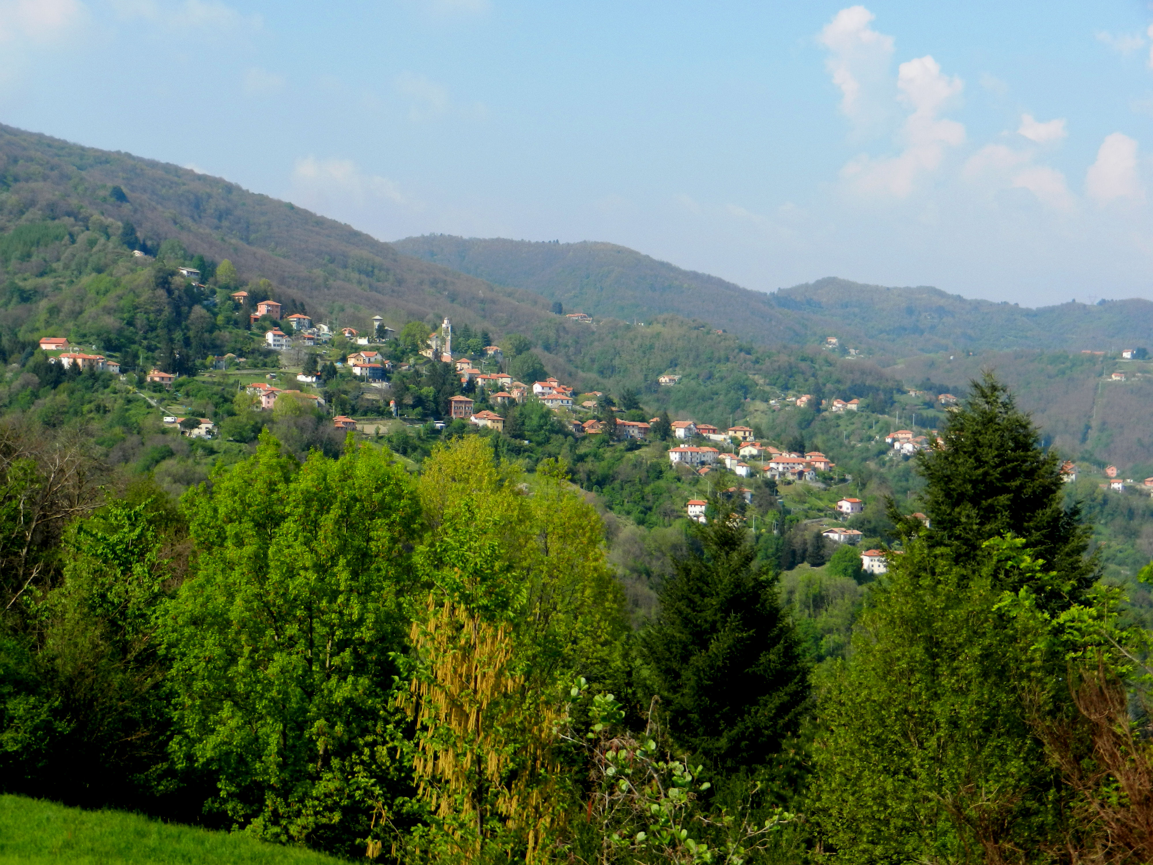 Mignanego, città metropolitana di Genova, frazione Paveto